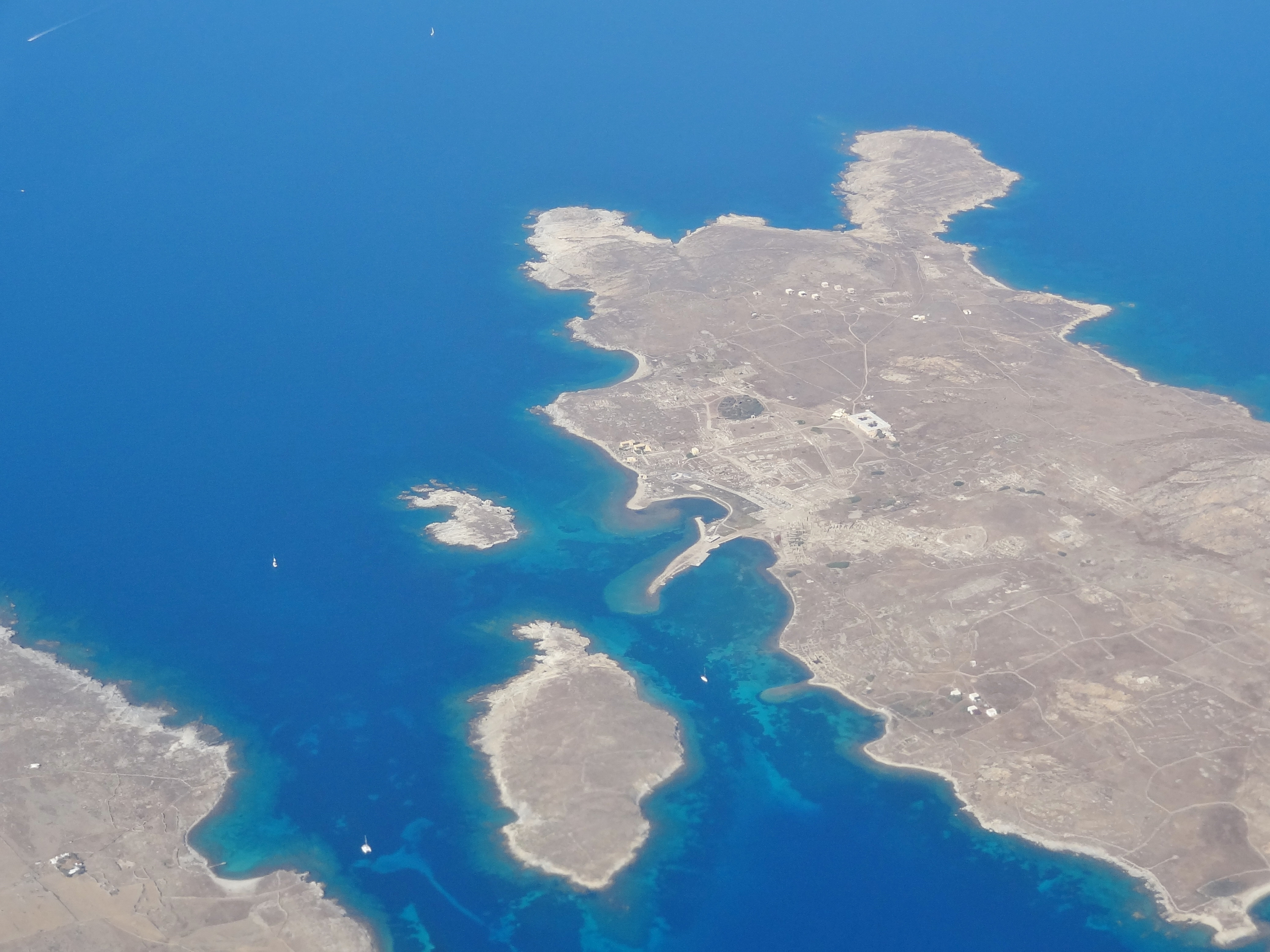 Luftbild von Delos, Kykladen, Griechenland